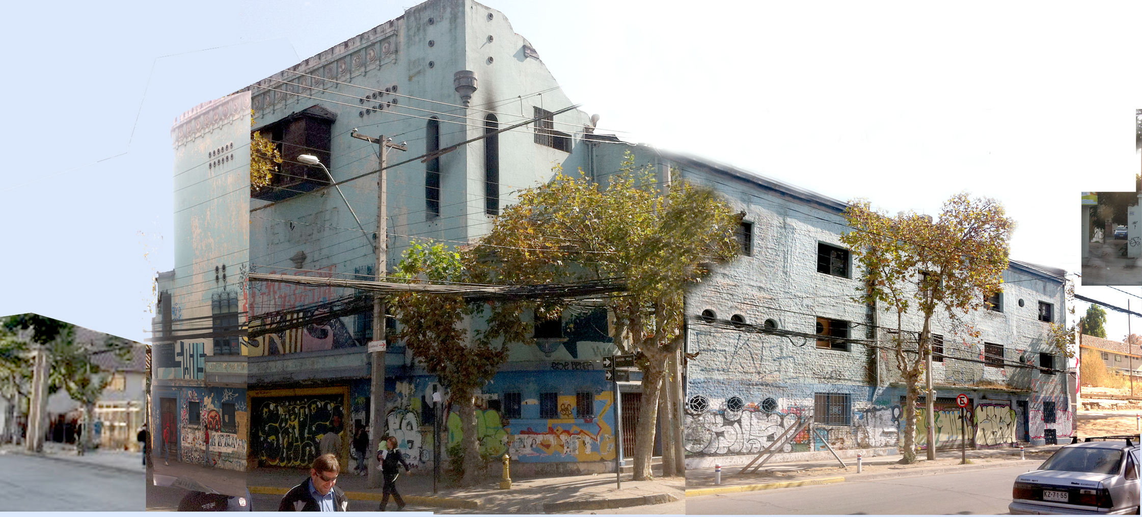 Ex teatro municipal de San Bernardo